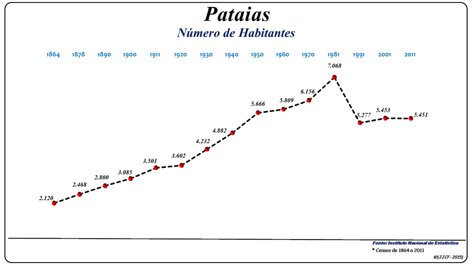 População